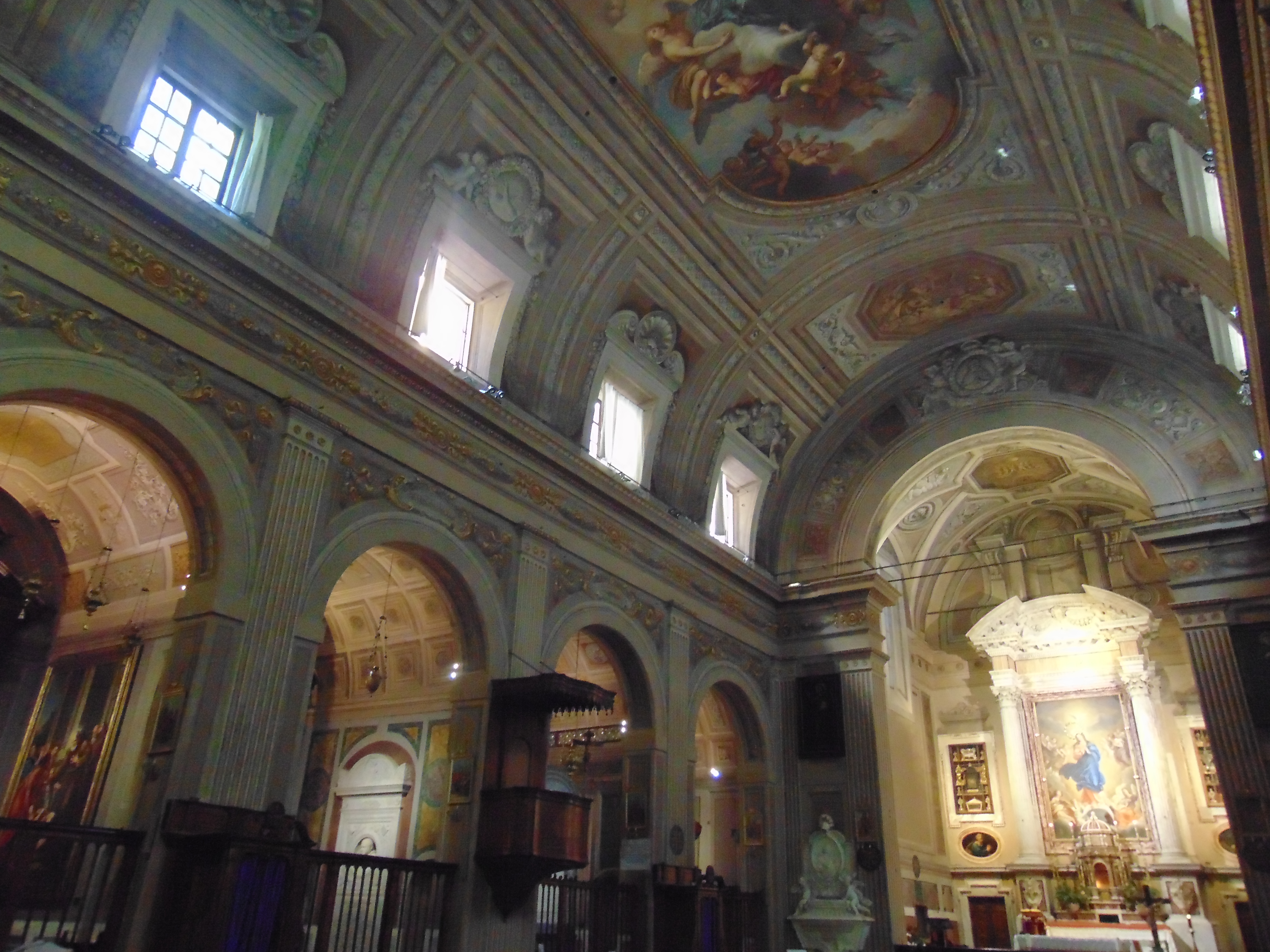 Chiesa di Santa Maria Immacolata a via Veneto